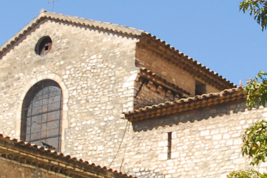 Kathedrale von Vence, Detail, Traufen der Schiffe